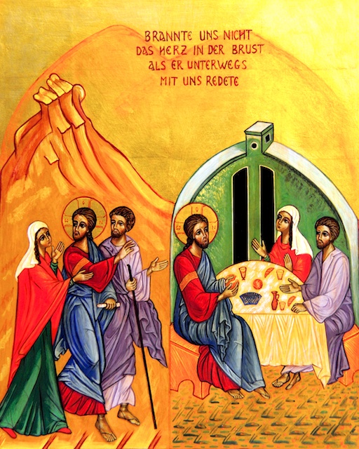 Emmausikone von Sr. Marie-Paul, Jerusalem für St. Adalbert, Aachen